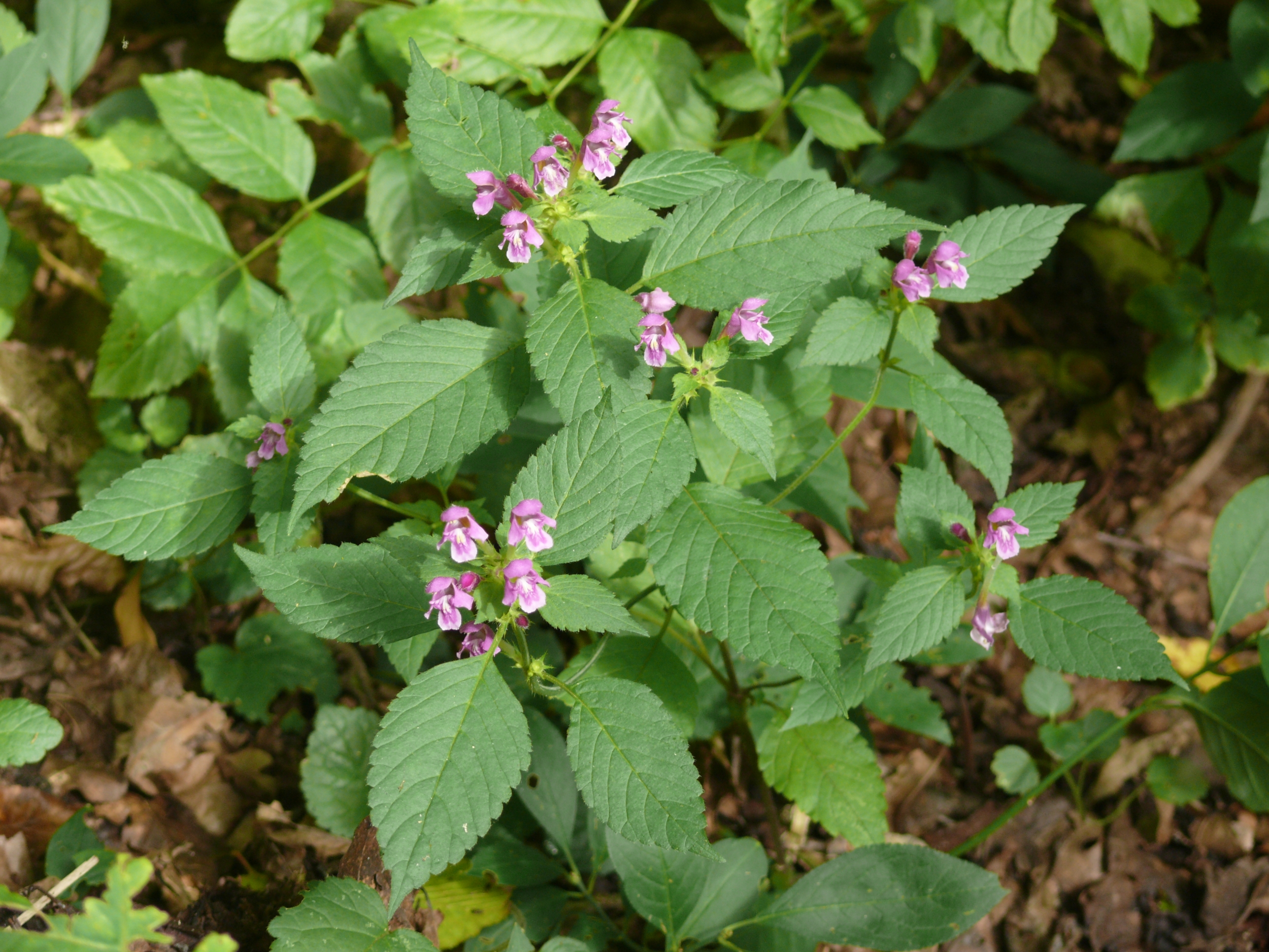 Galeopsis pubescens, Nördlinger Ries, Deutschland